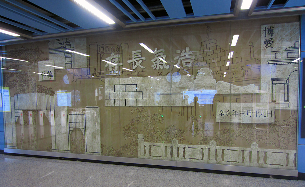 黃花崗站文化藝術牆